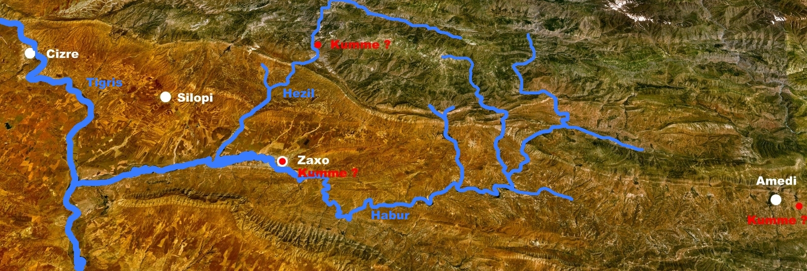 Landsat7 Aufnahme mit Lokalisierungsvorschlägen Kummes (Zaxo, Komane (=Kwani), oberer Hesil suyu) Quelle geprüft.OK--NebMaatRe 14:37, 13. Feb. 2009 (CET)